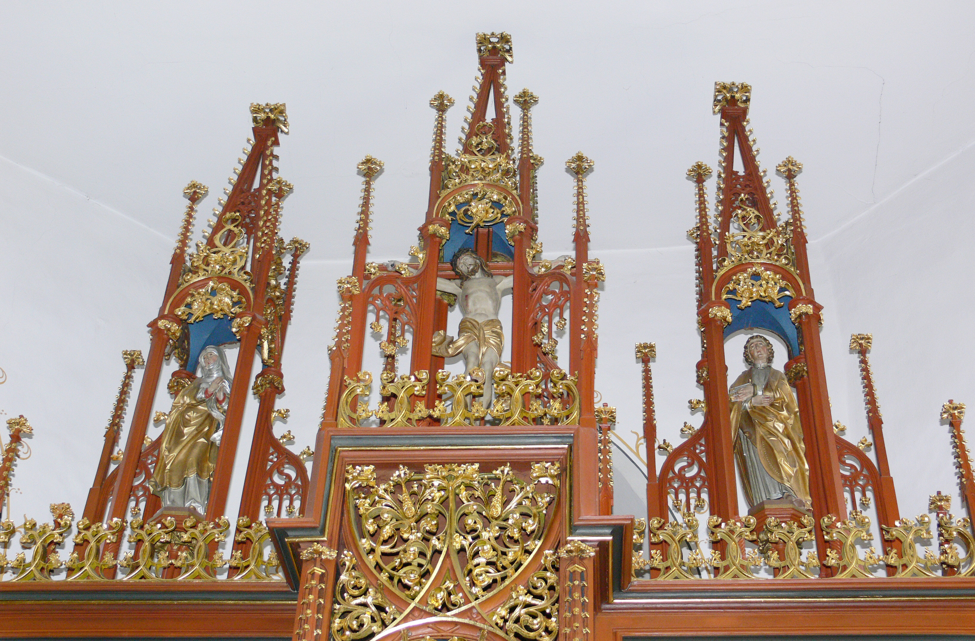 Limpach, Gemeinde Deggenhausertal: Pfarrkirche St. Georg, Hochaltar von Theodor Schnell d. J., um 1900: Gesprenge mit Kreuzigungsszene